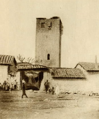 Маркова кула в Кавадарци на стара османска картичка